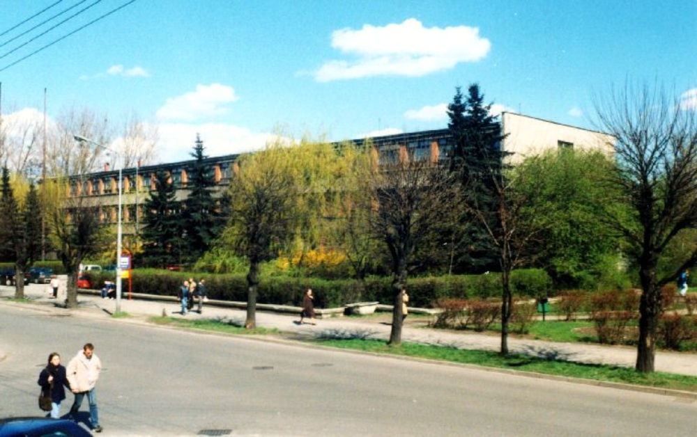 Tarnowskie Góry, ZSTIO Mechanik